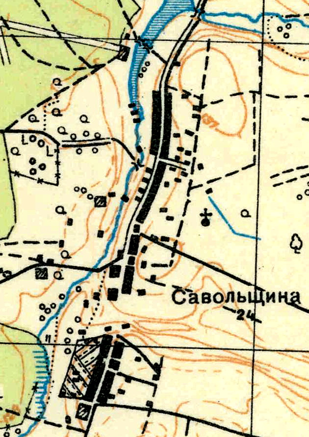 Топографическая карта Ленинградской области, квадрат О-35-11-Г-в (Воронина), деревня Савольщина.